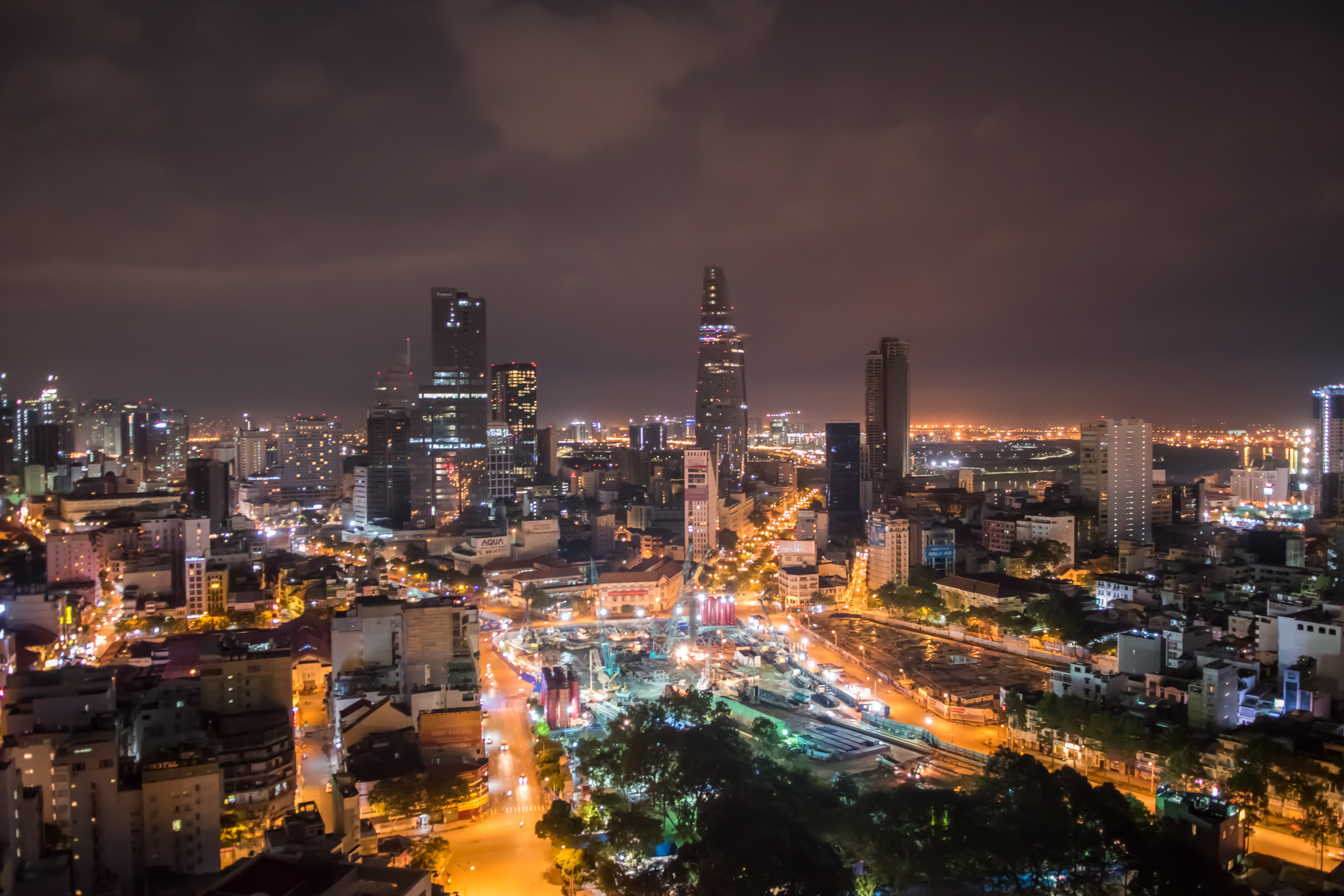 Ho Chi Minh city Vietnam Saigon